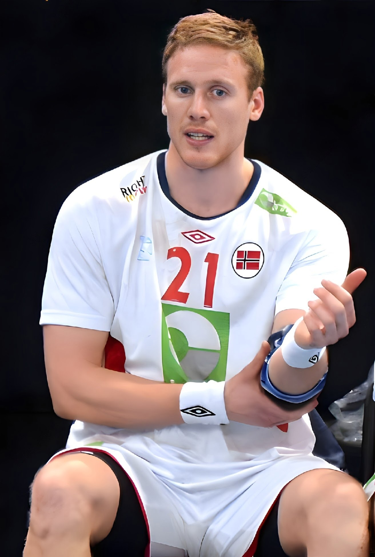 Le 10 janvier 2016 lors du match Norvège / Qatar durant la Golden League à l'AccordHotel Arena (Paris). Magnus Gullerud-Petter Øverby-Christian Berge